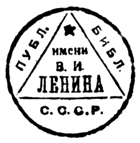 Печать Ленинской библиотеки 20х-30х годов